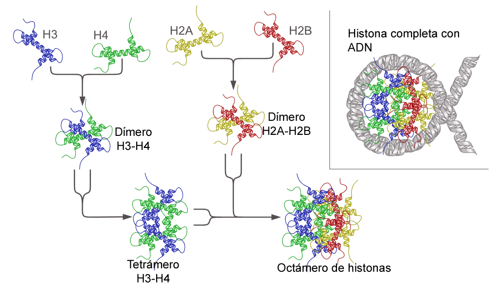 Traducción de la imagen Nucleosome_structure.png